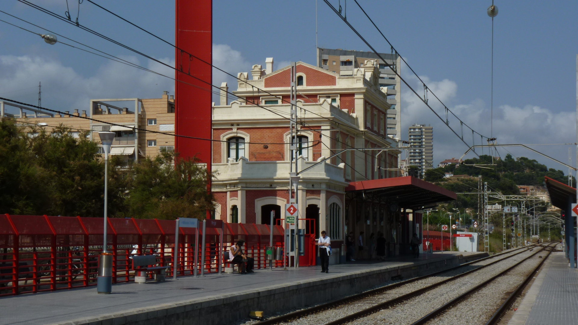 Estació de Montgat